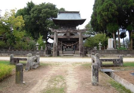 梅林天満宮（熊本県玉名市）。鳥居、楼門はいずれも国の登録有形文化財。